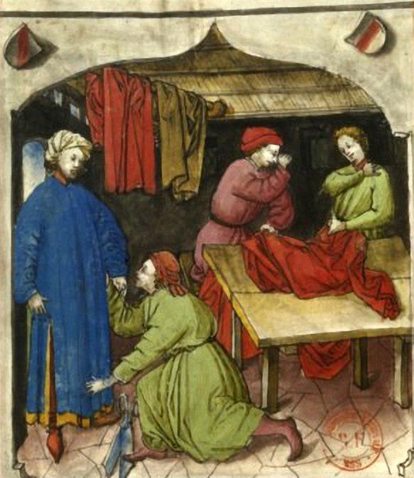 Шерстяной цех. Миниатюра из Tacuinum sanitalis (Latin 9333, fol. 103). XV век. Национальная библиотека Франции, департамент манускриптов.